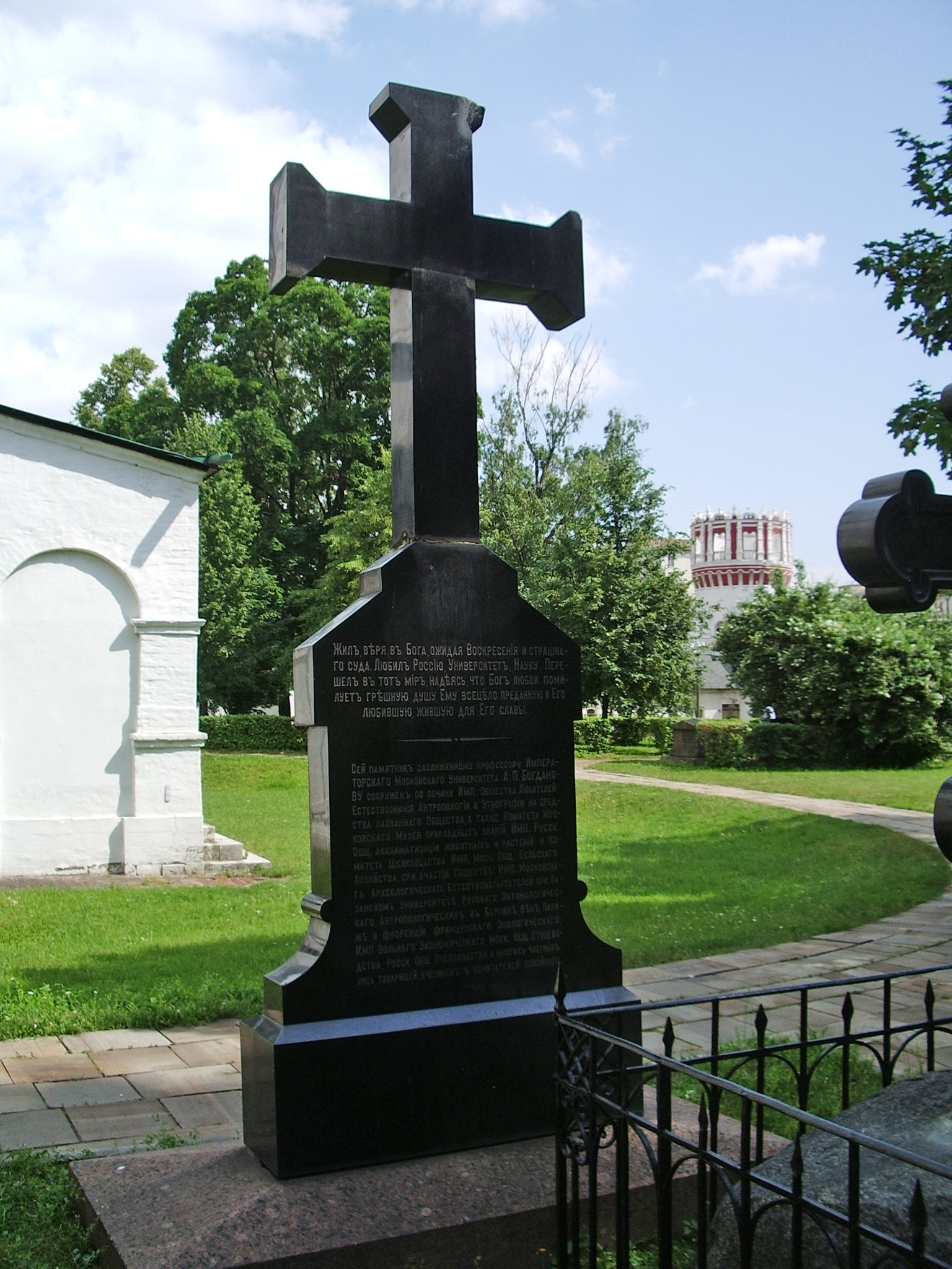 Могила Анатолия Петровича Богданова в некрополе Новодевичьего монастыря